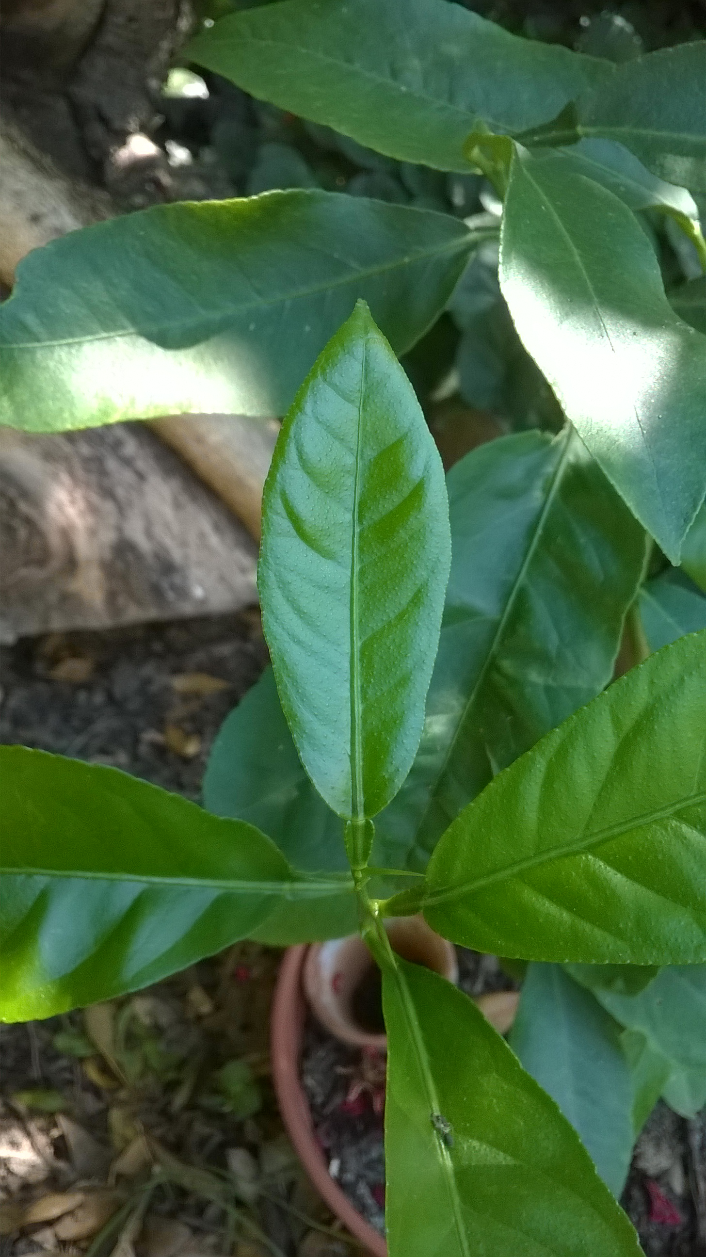 Feuille de citronnier présentant un pétiole ailé (relativement atypique mais pas rare).